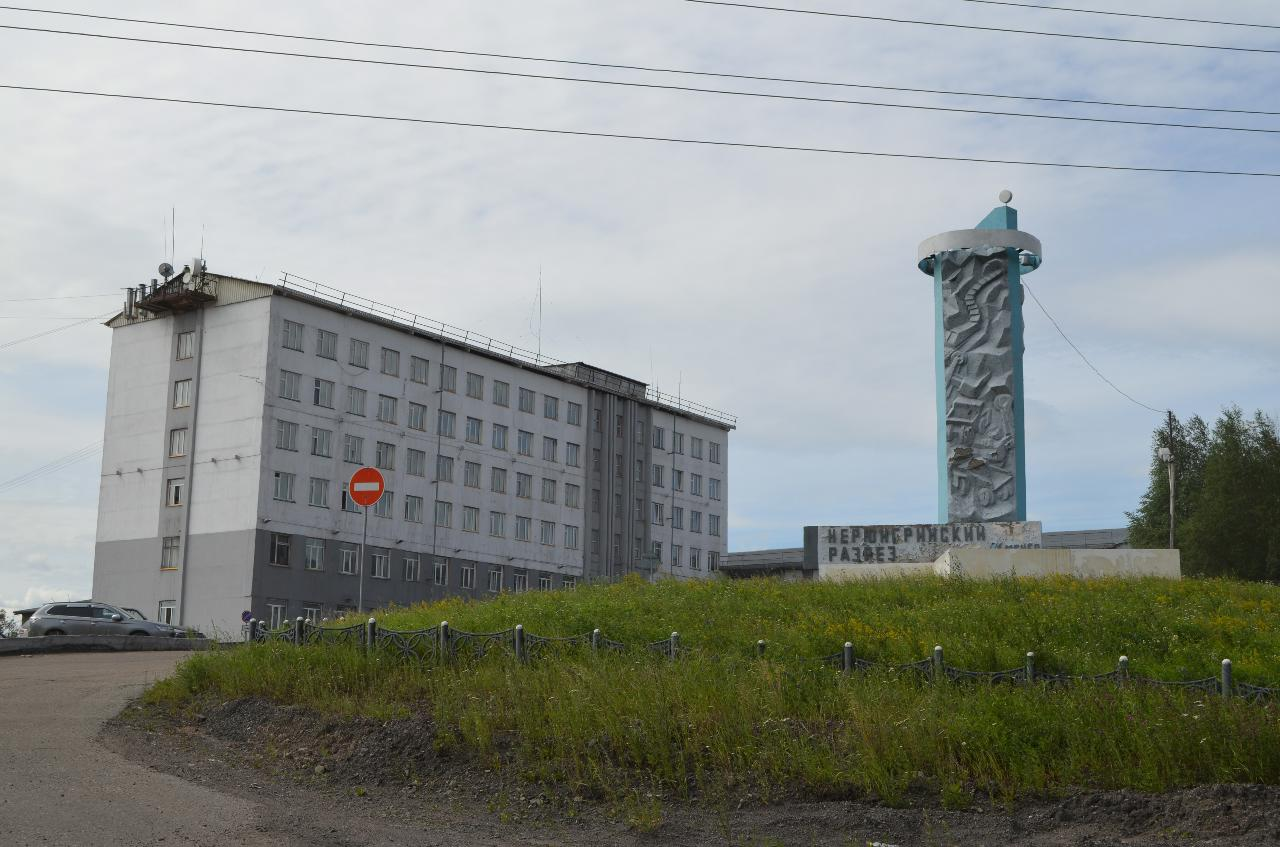 Нерюнгри. Административное здание Нерюнгринского угольного разреза